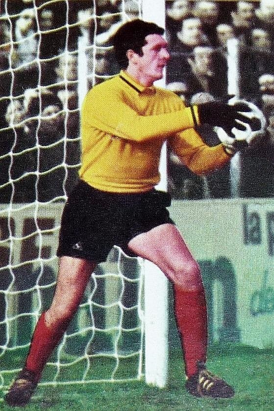 Dominique Dropsy en 1972 (US Valencienne), 'Ageducatifs Football 1972 - 1973', Panini figurina n°132